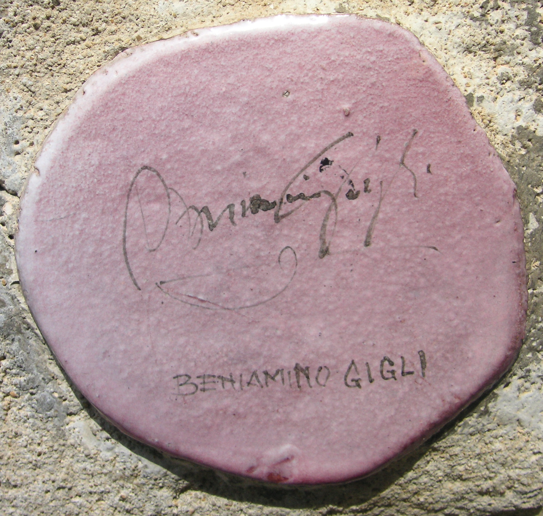 Piastrella con l'autografo di Beniamino Gigli sul muretto di Alassio.